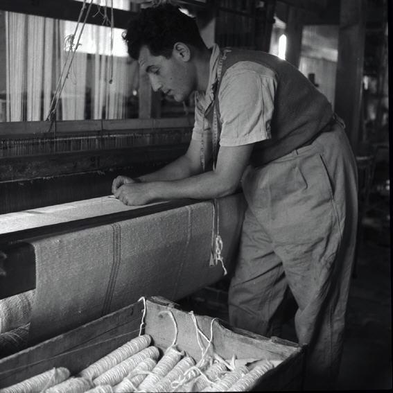 בבית החרושת לאריגה במצובה